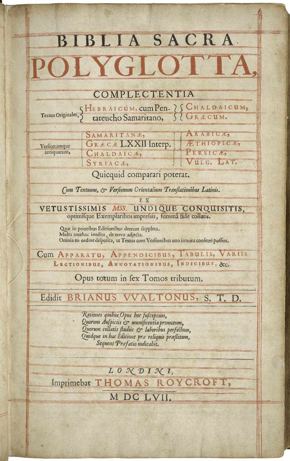 Титульный лист Лондонской полиглотты